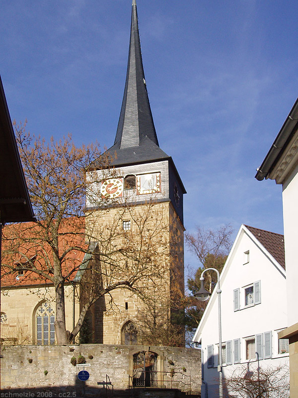 'Ev. Pfarrkirche St. Kilian in Obersulm-Sülzbach, 1243 erstmals erwähnt, ursprünglich gotische Chorturmanlage, 1619 im Stil der Renaissance umgebaut und im 17. Jahrhundert mehrfach reich im Inneren ausgeschmückt. Von einer historischen Kirchmauer umgebener Kirchhof mit Beheim-Sühnekreuz.